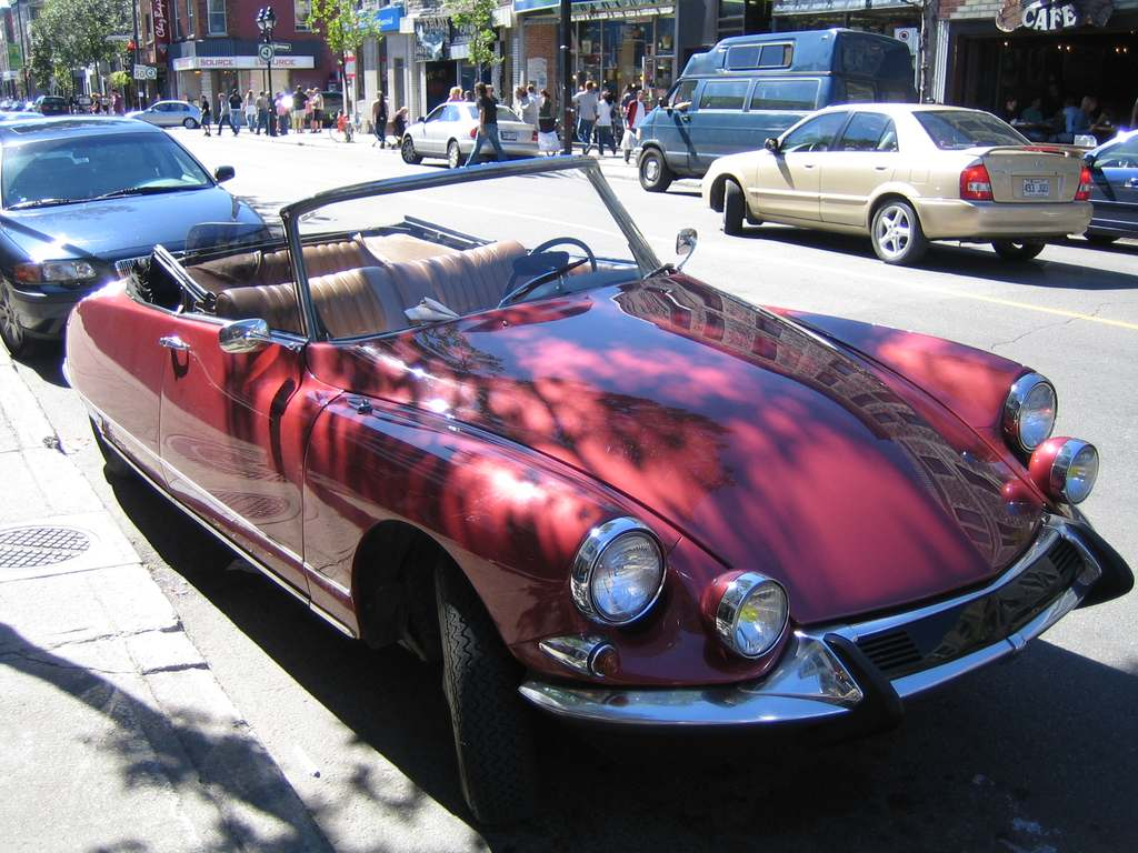 Citroen DS cabrio 1957